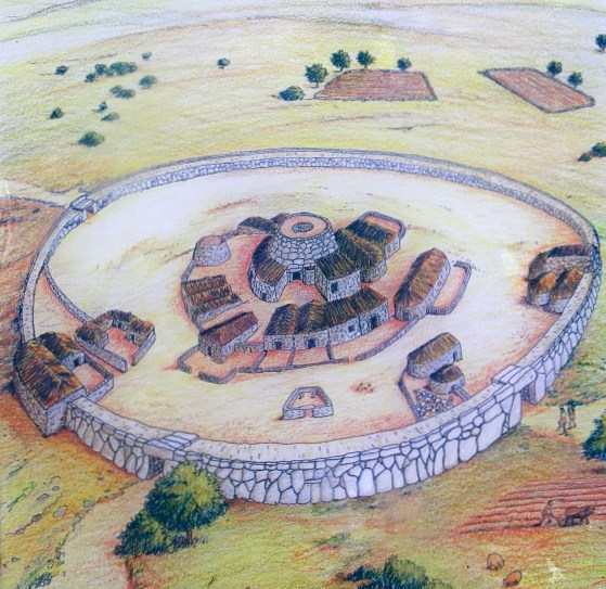 Schautafel vor dem Eingang in die Talayot-Siedlung SesPaïsses bei Artà im Nordosten Mallorcas (Ausschnitt).